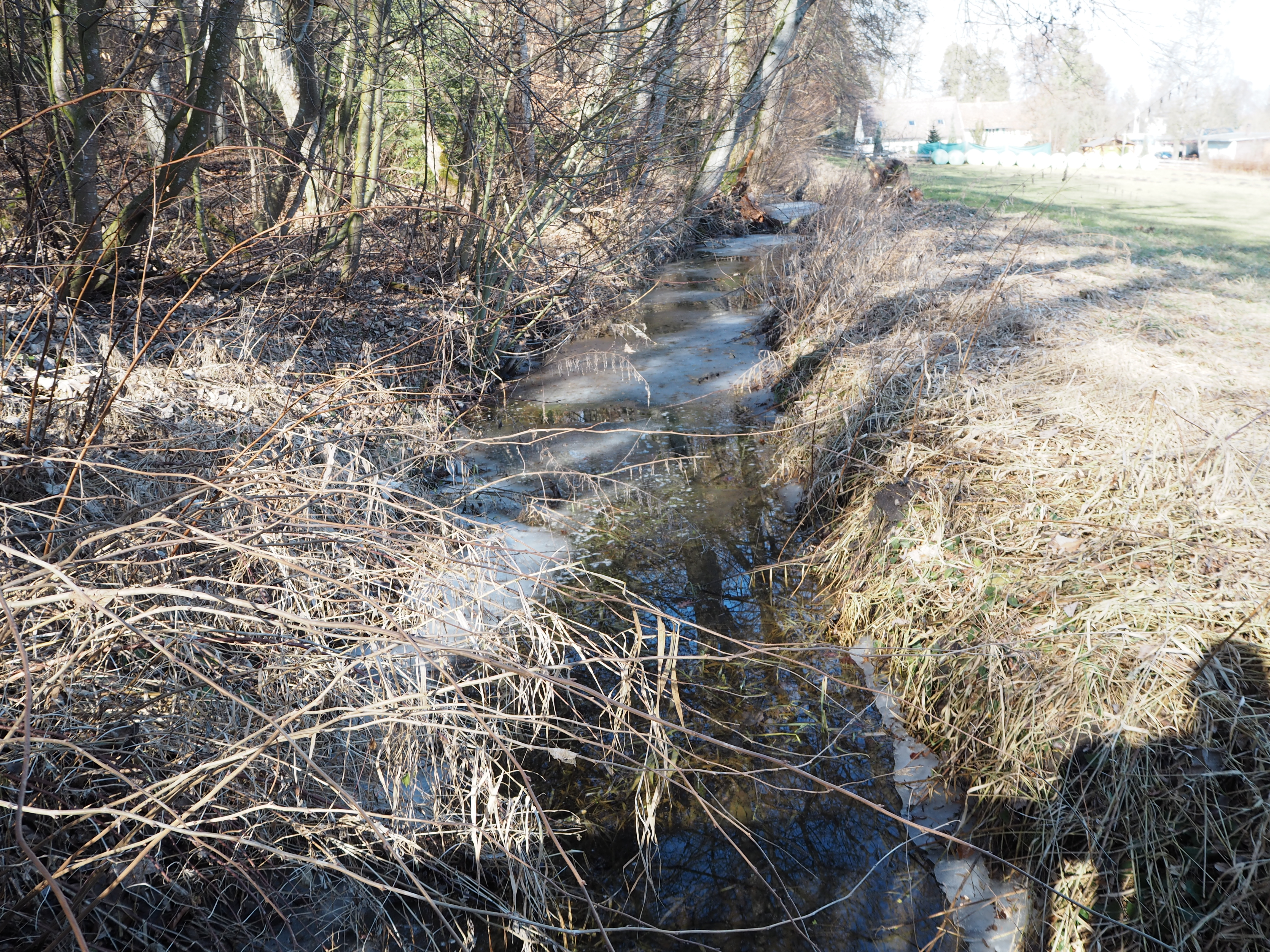 Naturlehrgarten Mindelheim, Oberlauf des Papierbach kurz nach dem Abzweig und vor den Quellzuflüssen.